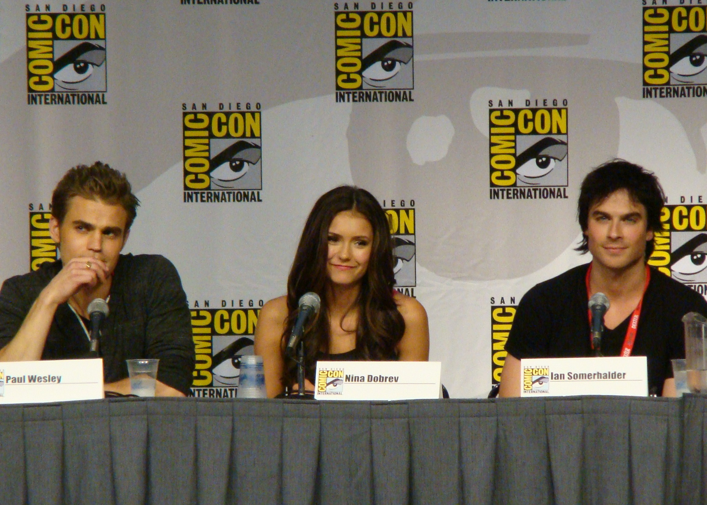 Paul Wesley, Nina Dobrev & Ian Somerhalder